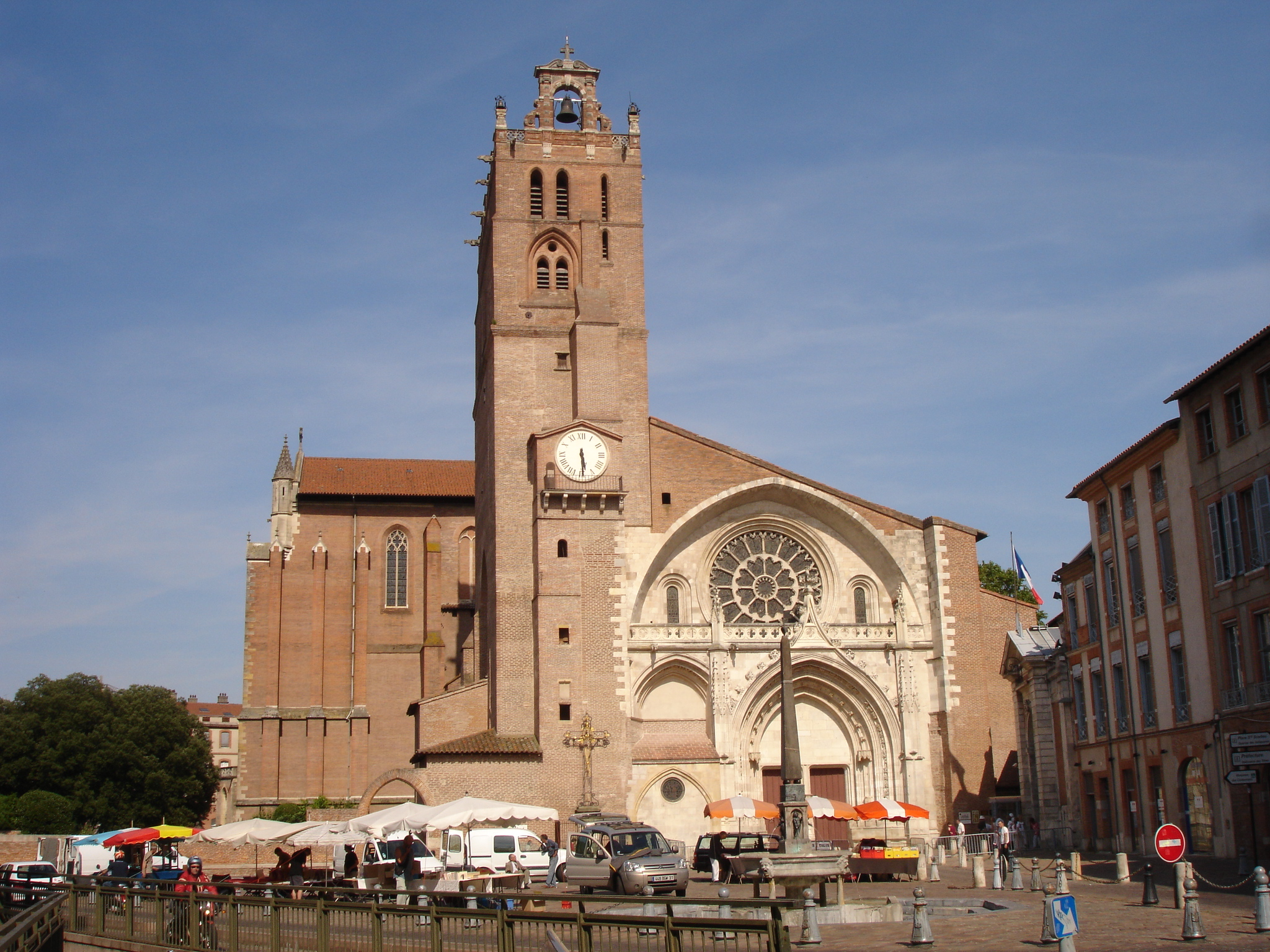 France, Haute-Garonne, Toulouse, Cathédrale Saint-Étienne.